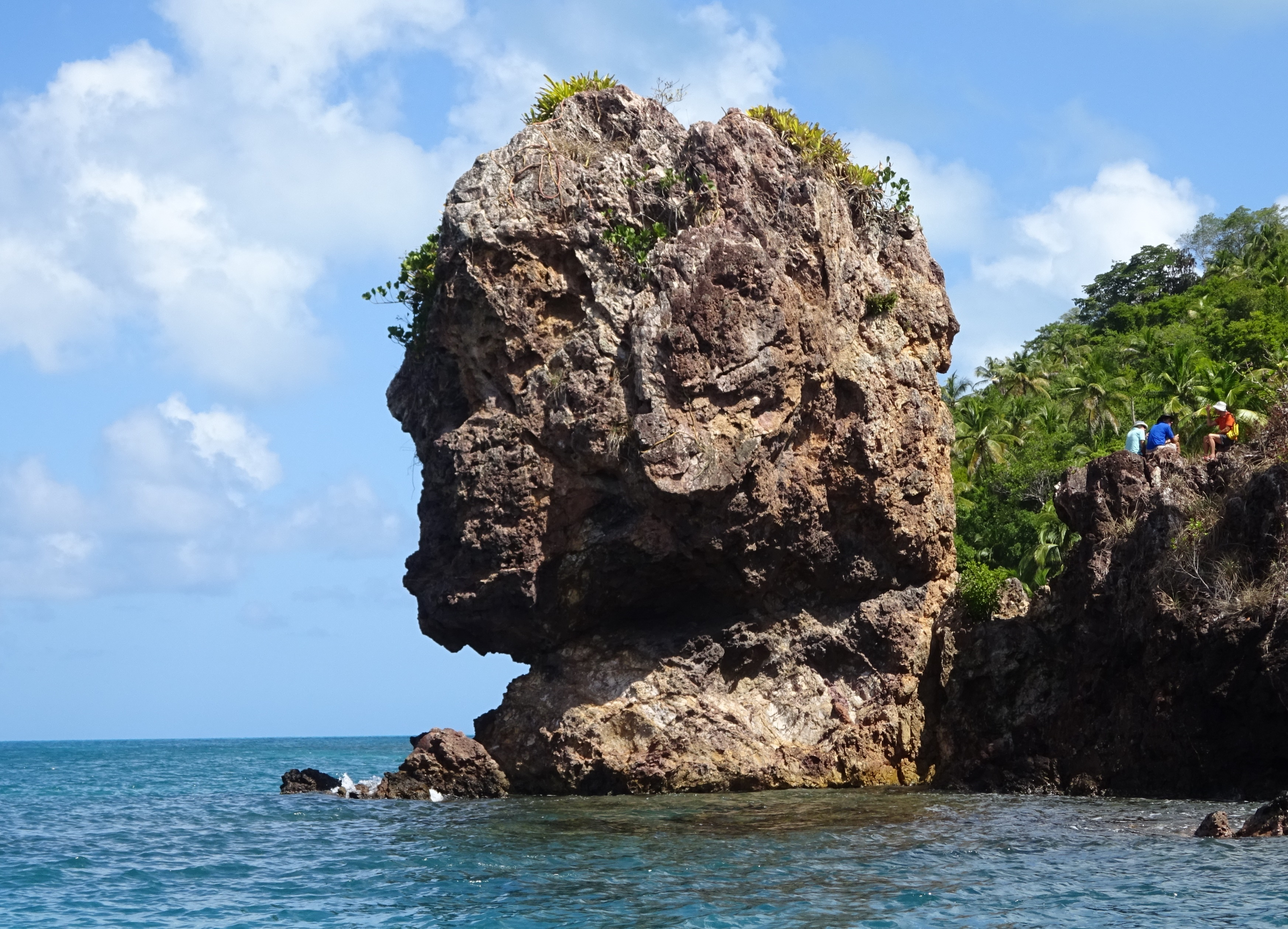 La cabeza de Morgan, una formación rocosa en la isla de Santa Catalina